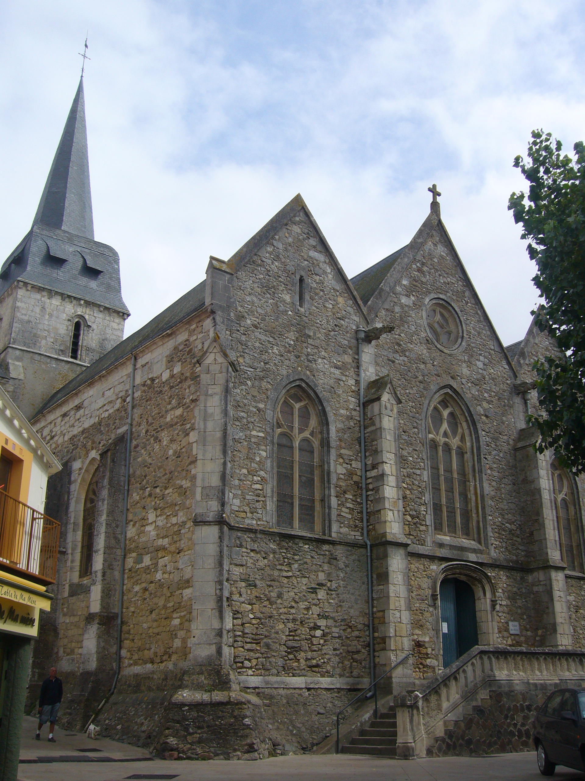 Saint-Gilles-Croix-de-Vie dans le département de la Vendée (France) : Église Saint-Gilles en septembre 2007.